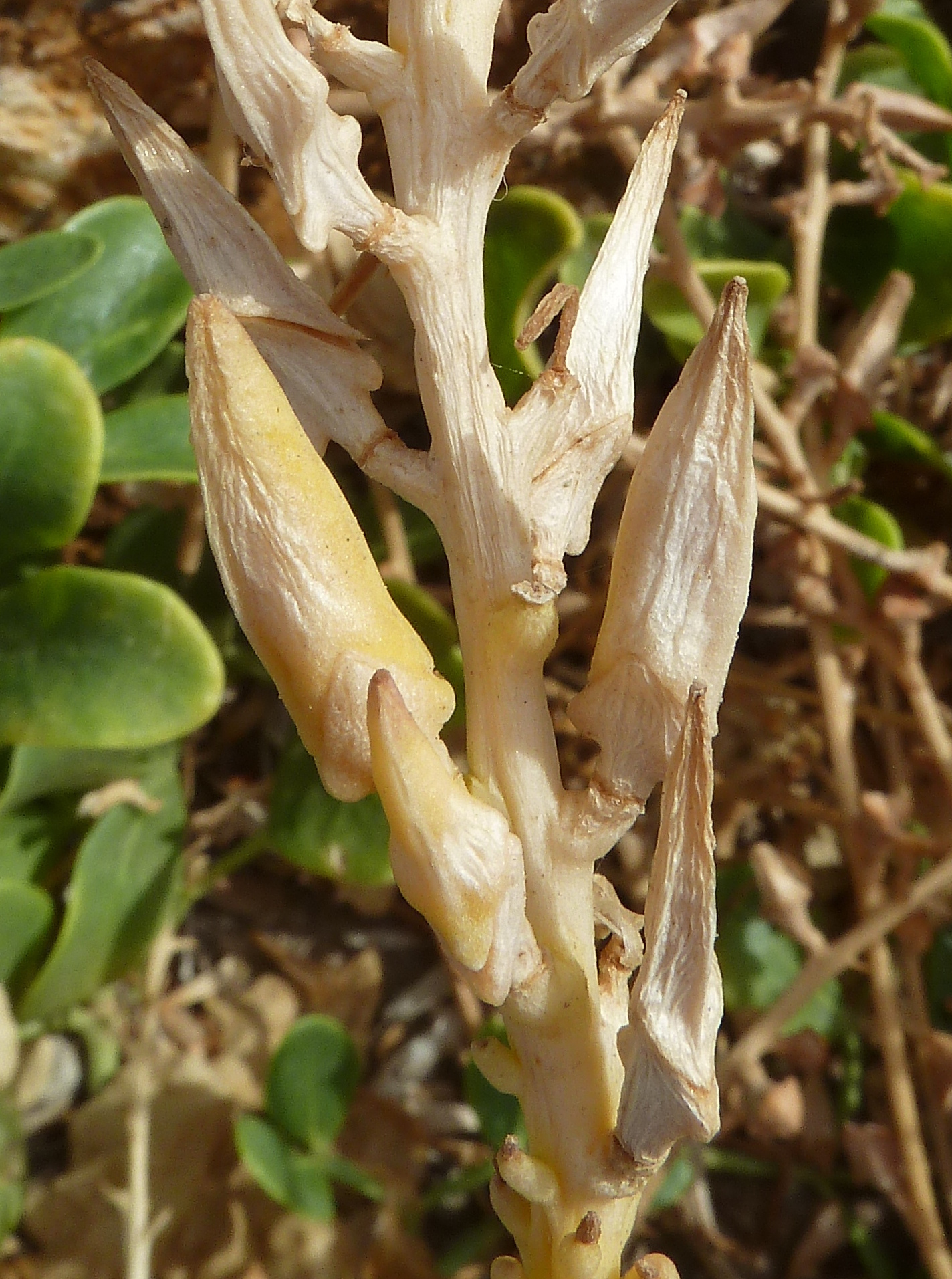 Cakile maritima (Oruga de mar) : Frutos articulados maduros in situ - Dique de la Rambla de Cañarete, Águilas (Murcia, España).